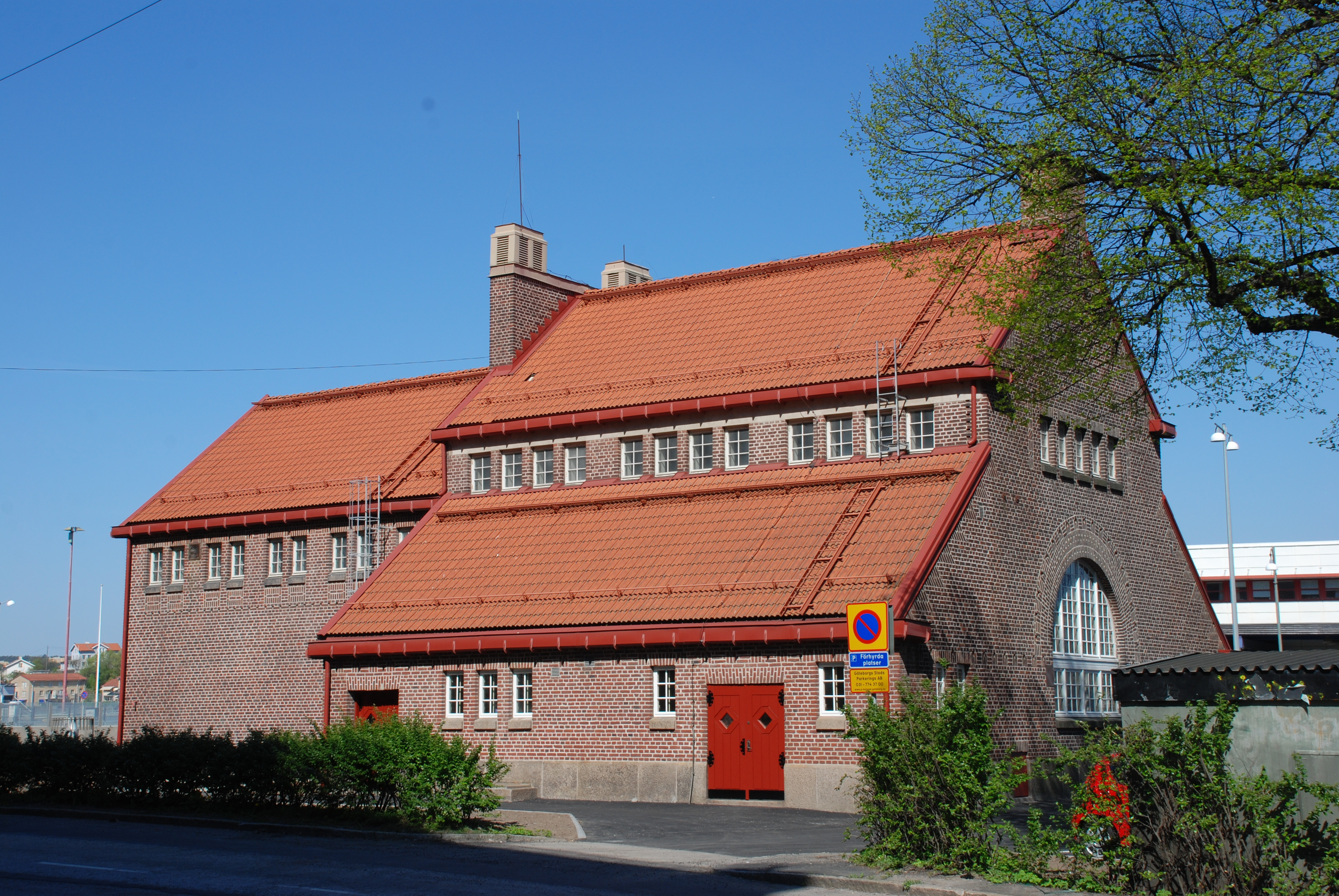 Före detta pumpstationen vid Barlastgatan i stadsdelen Masthugget i Göteborg. Ritad av arkitekterna H och B Hedlund, uppförd 1911.